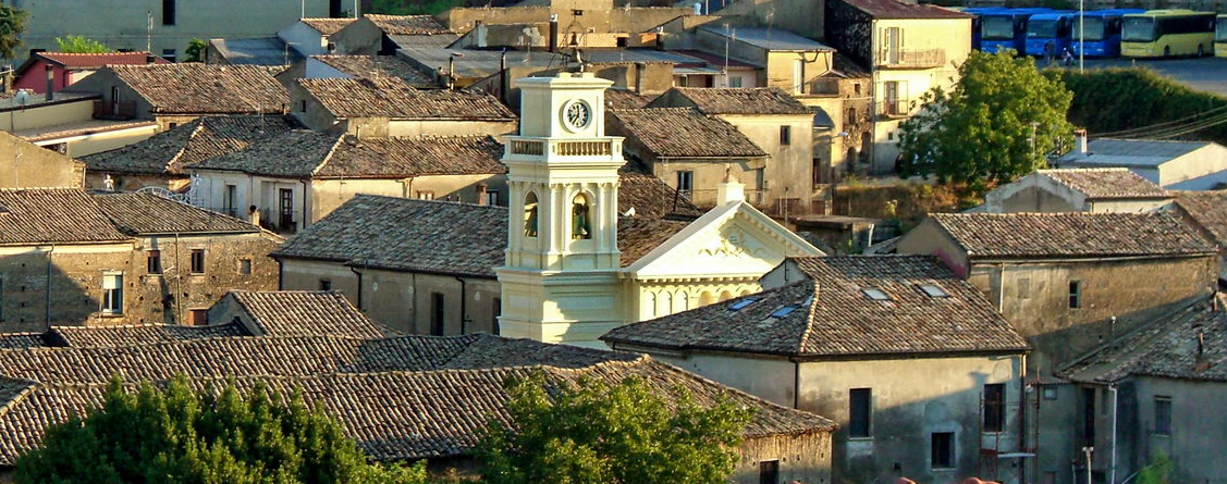 Chiesa di San Rocco di Girifalco (CZ), particolare del campanile.